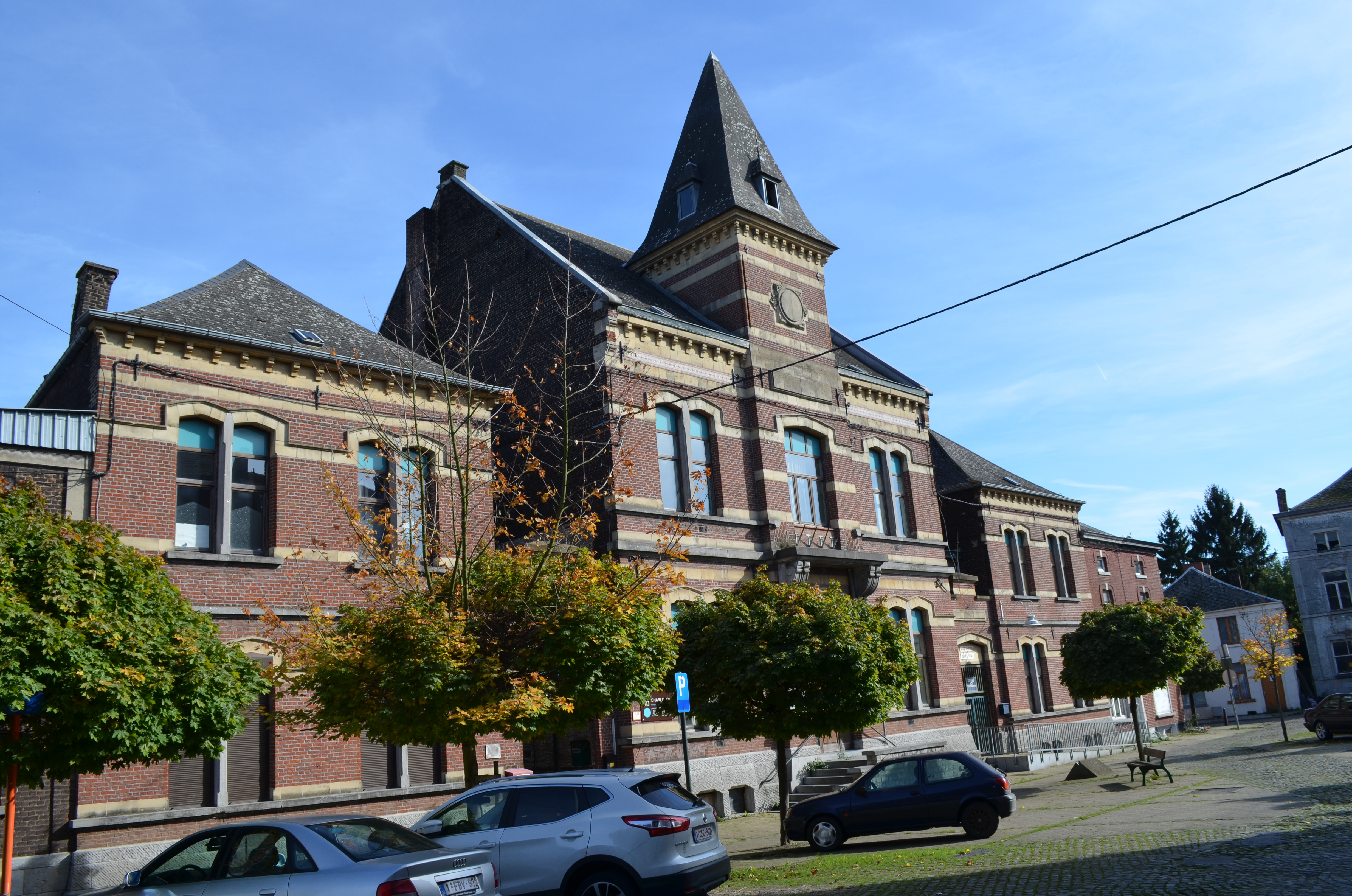 Couillet (Charleroi-Belgique) - Hôtel de Ville.